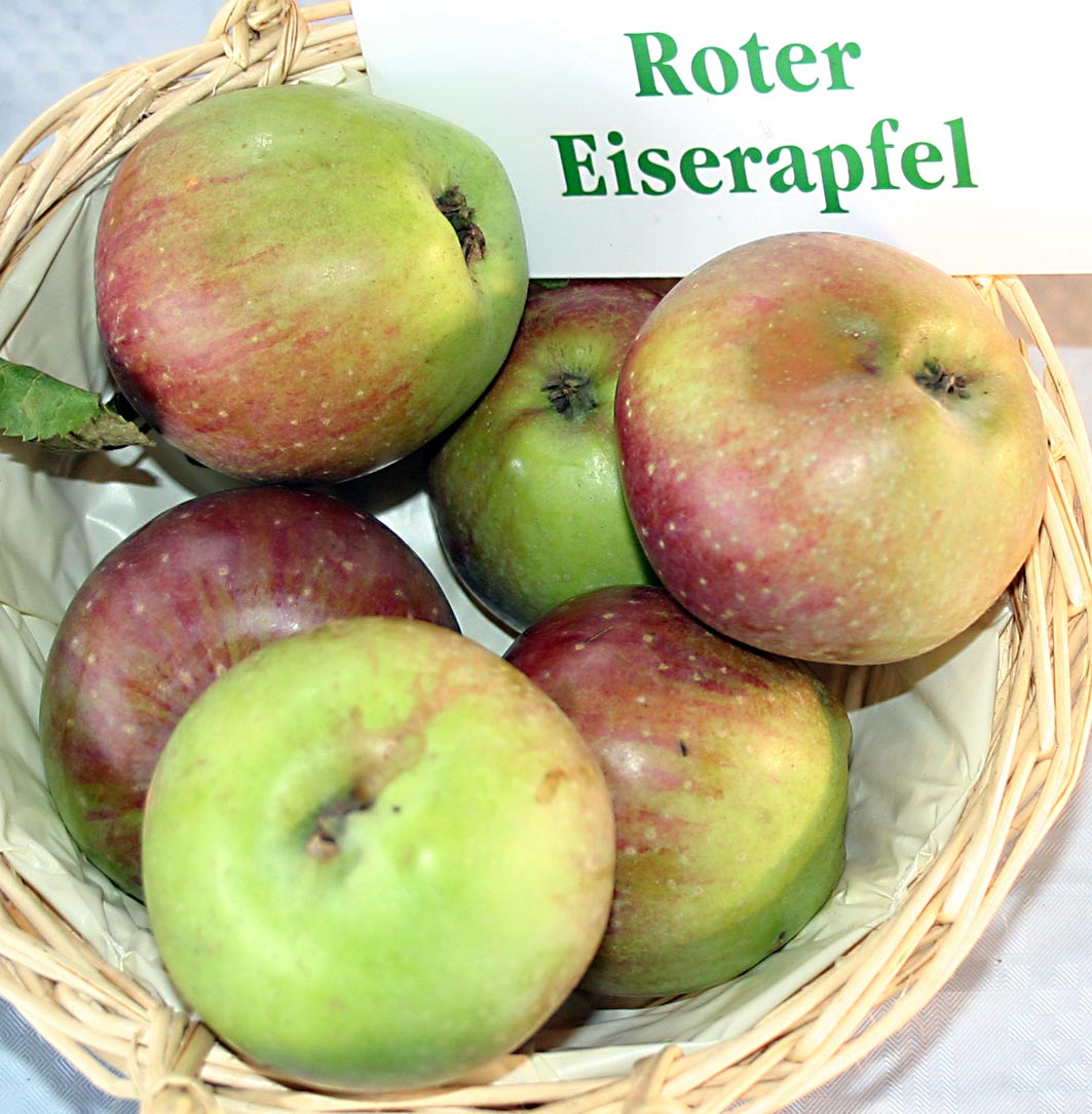 Malus "Roter Eiserapfel", Büdingen